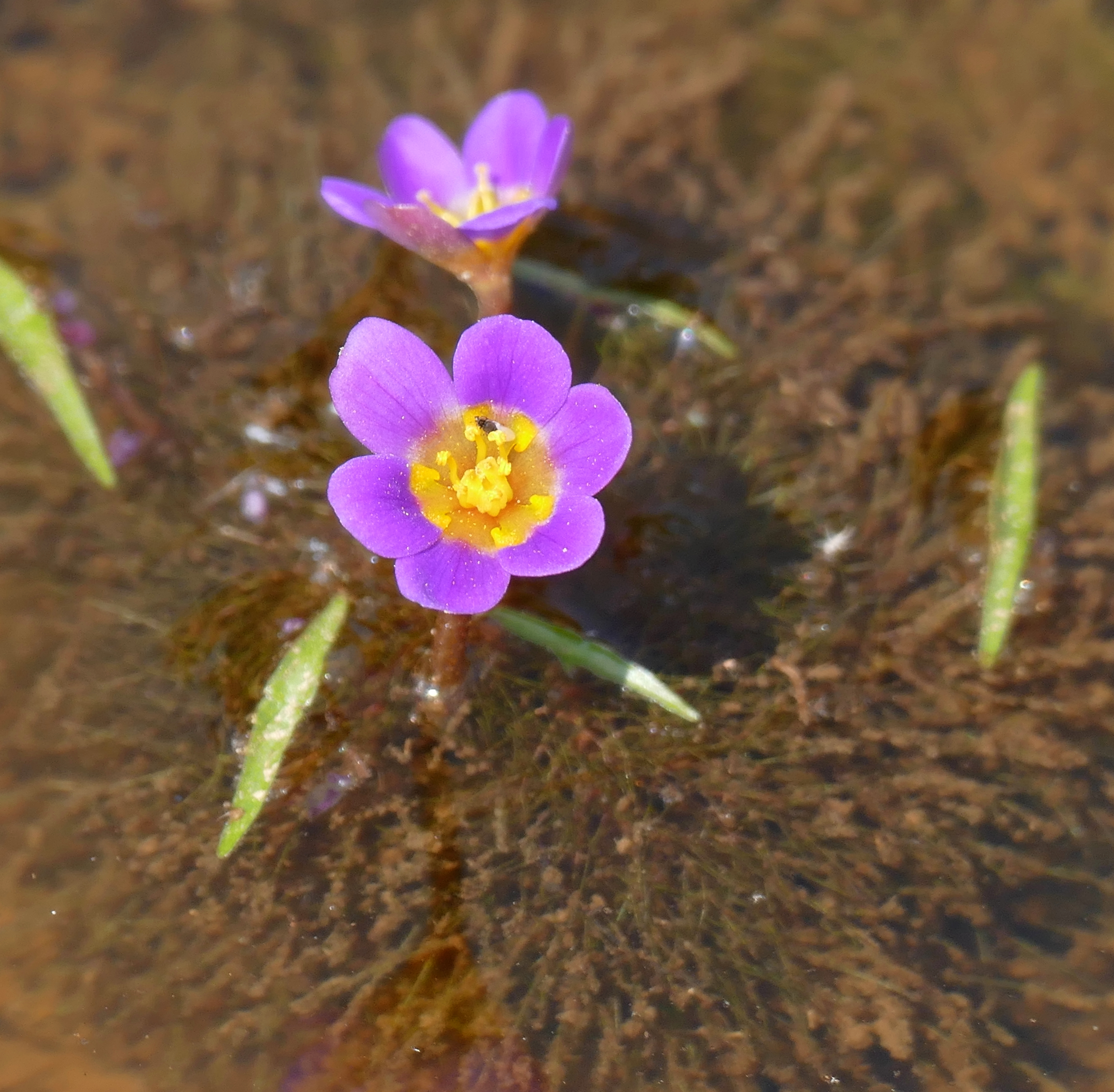 Transpantaneira, Poconé, Mato Grosso, BRAZIL